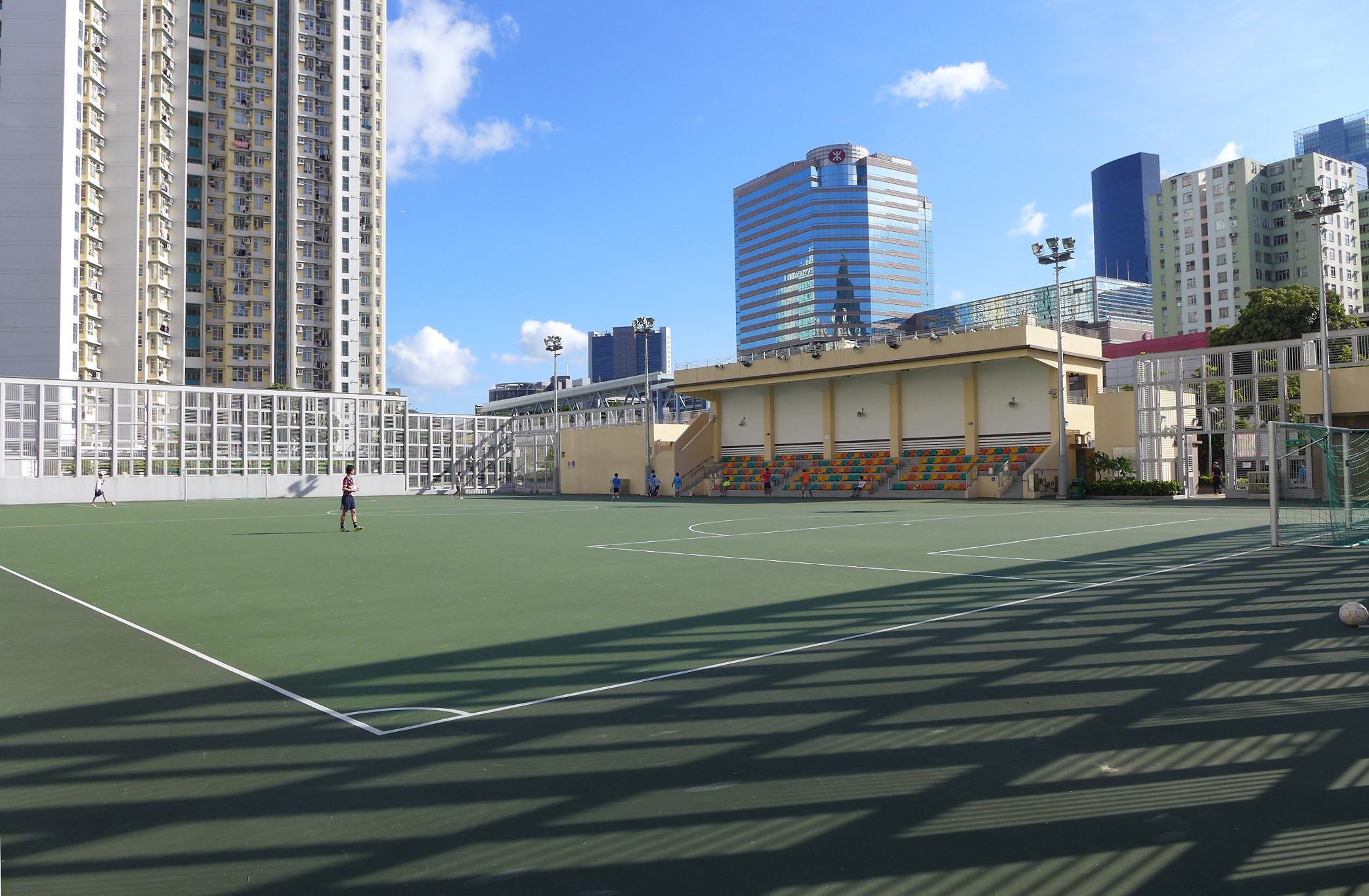 Ngau Tau Kok Park Football Field